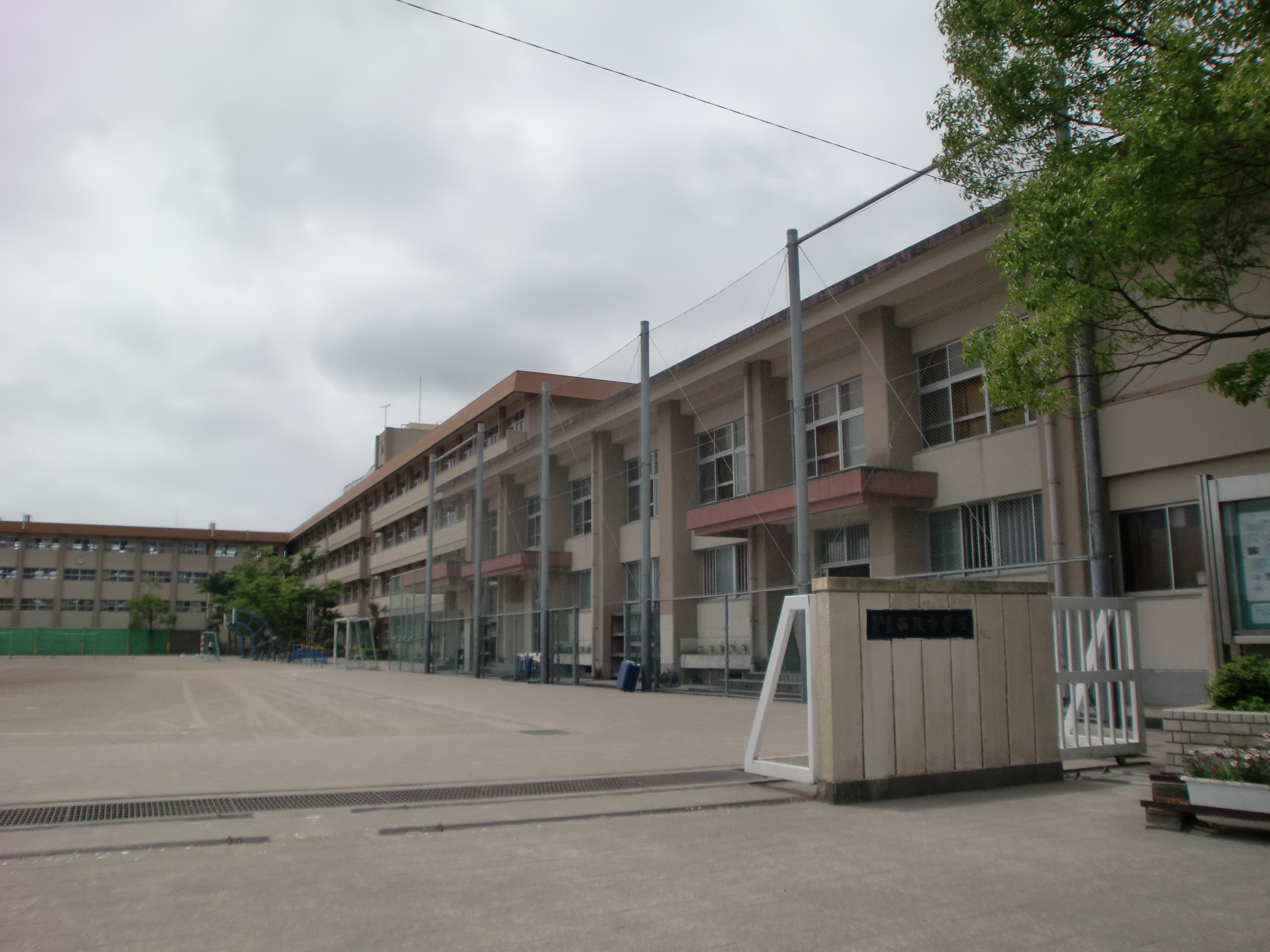 鹿児島市立西陵中学校の外観。